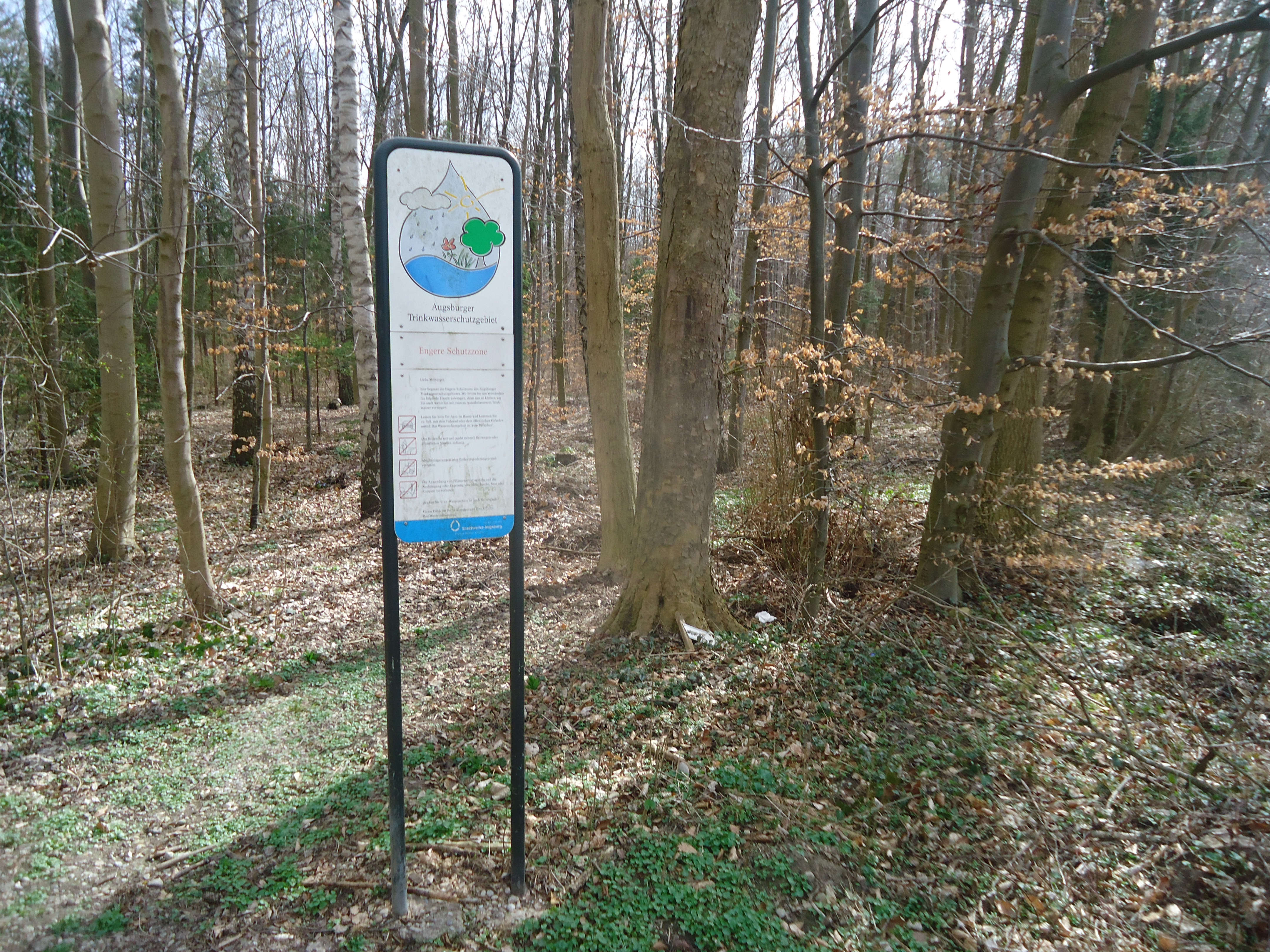 Hinweistafel „Augsburger Trinkwasserschutzgebiet, Engere Schutzzone“ im Siebentischwald Augsburg